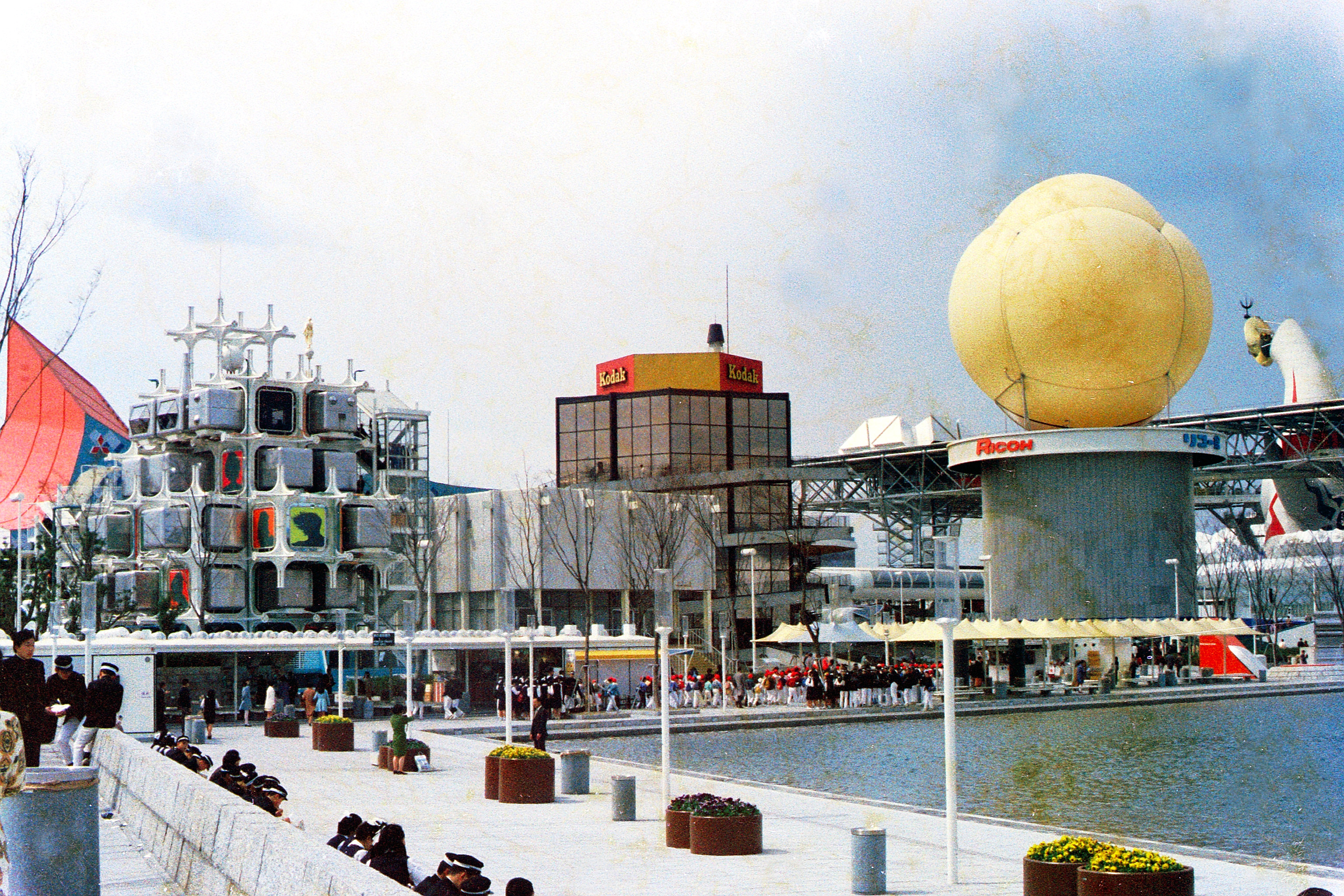 April 1970, Osaka Expo'70.